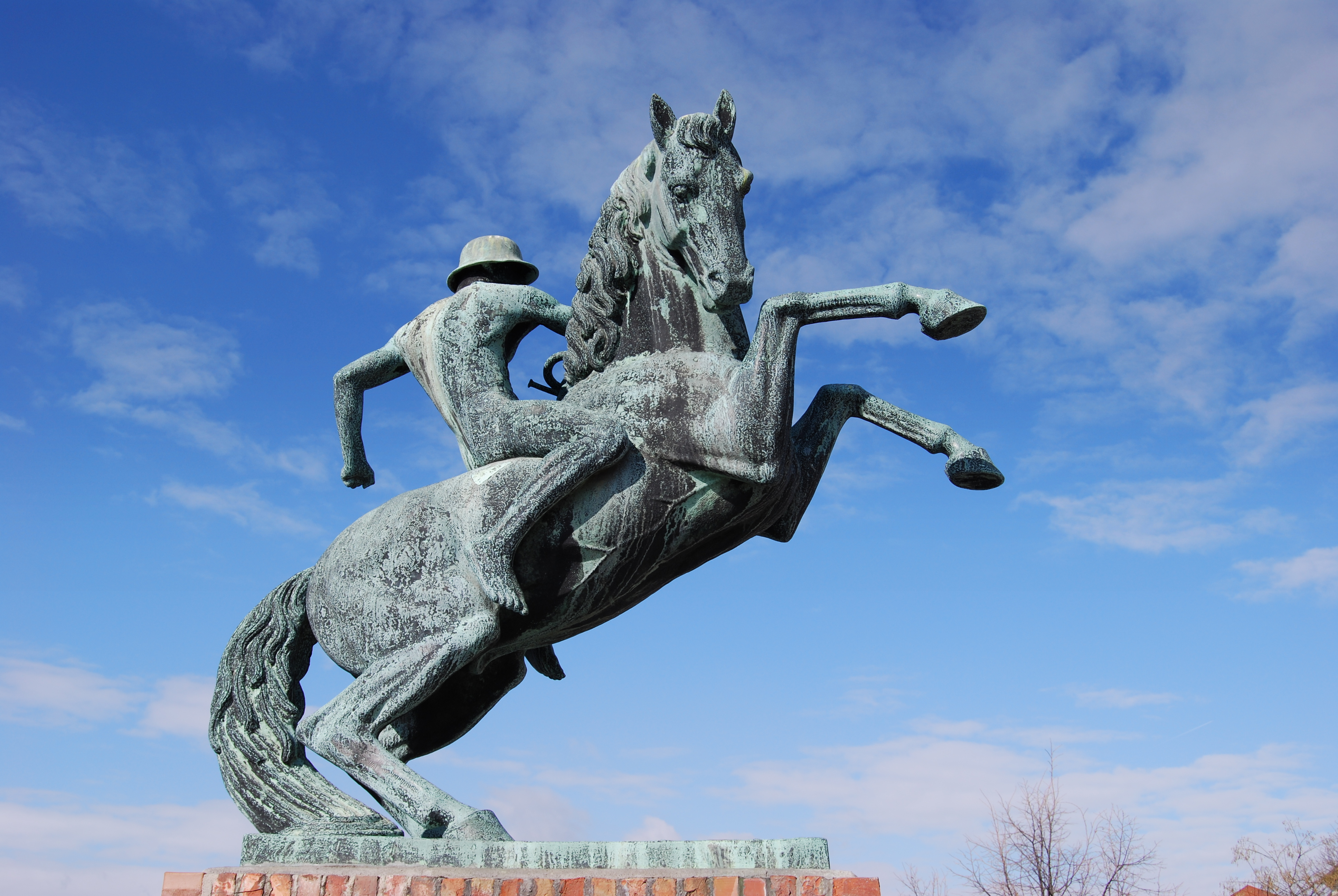 Budavár, Az erdélyi 2-es (székely) huszárok szobra